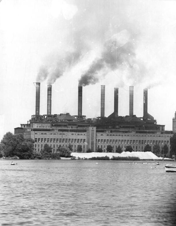 Berlin, Kraftwerk Klingenberg Zentralbild Schmidtke 22.6.1951 Kraftwerk Klingenberg, Berlin